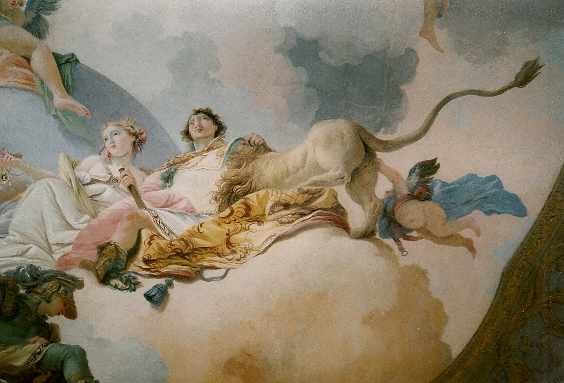 detail